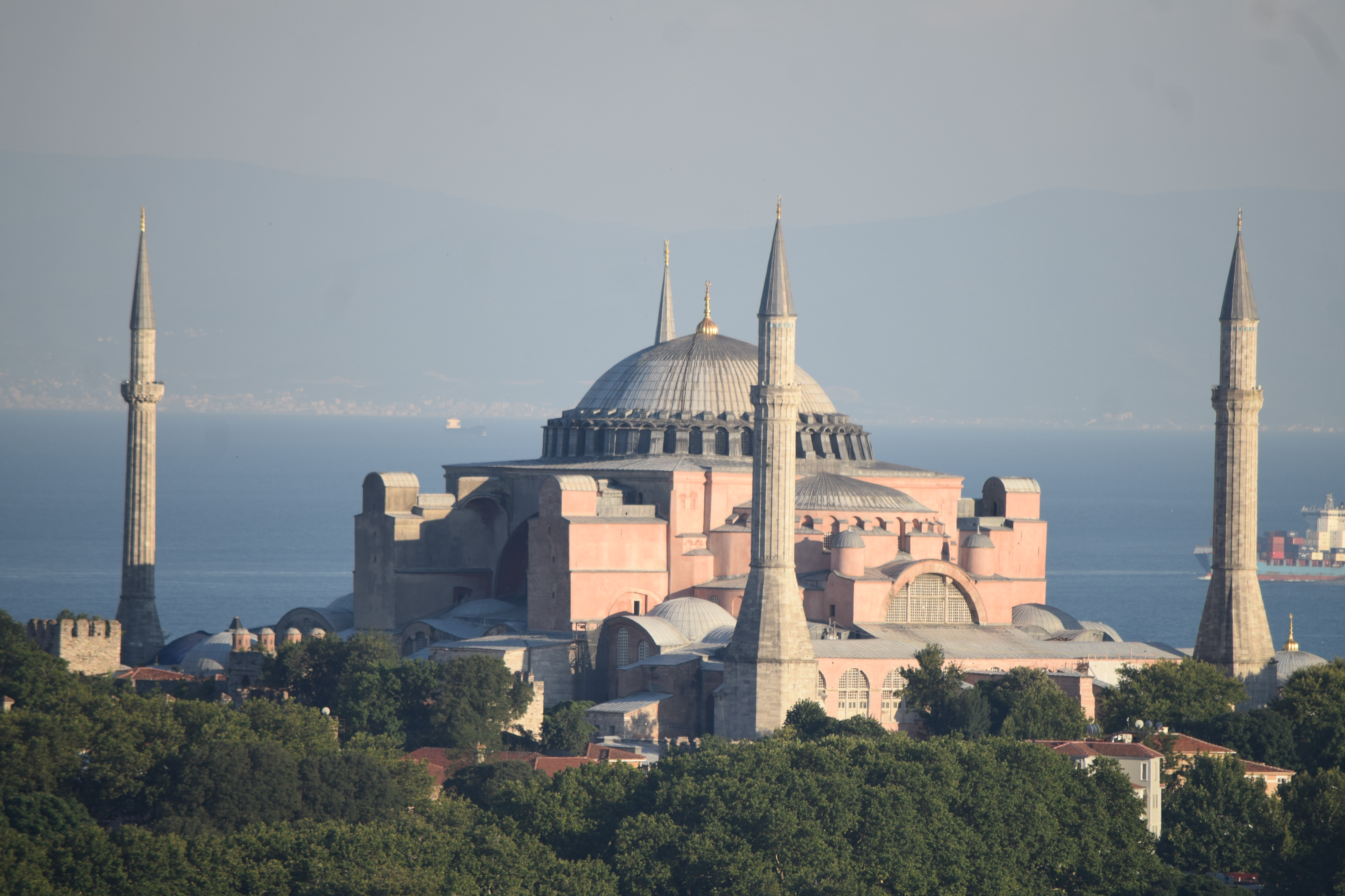 Hagia Sofia o Santa Sofía en Estambul, Turquía